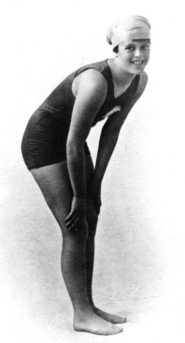 Violet Walrond